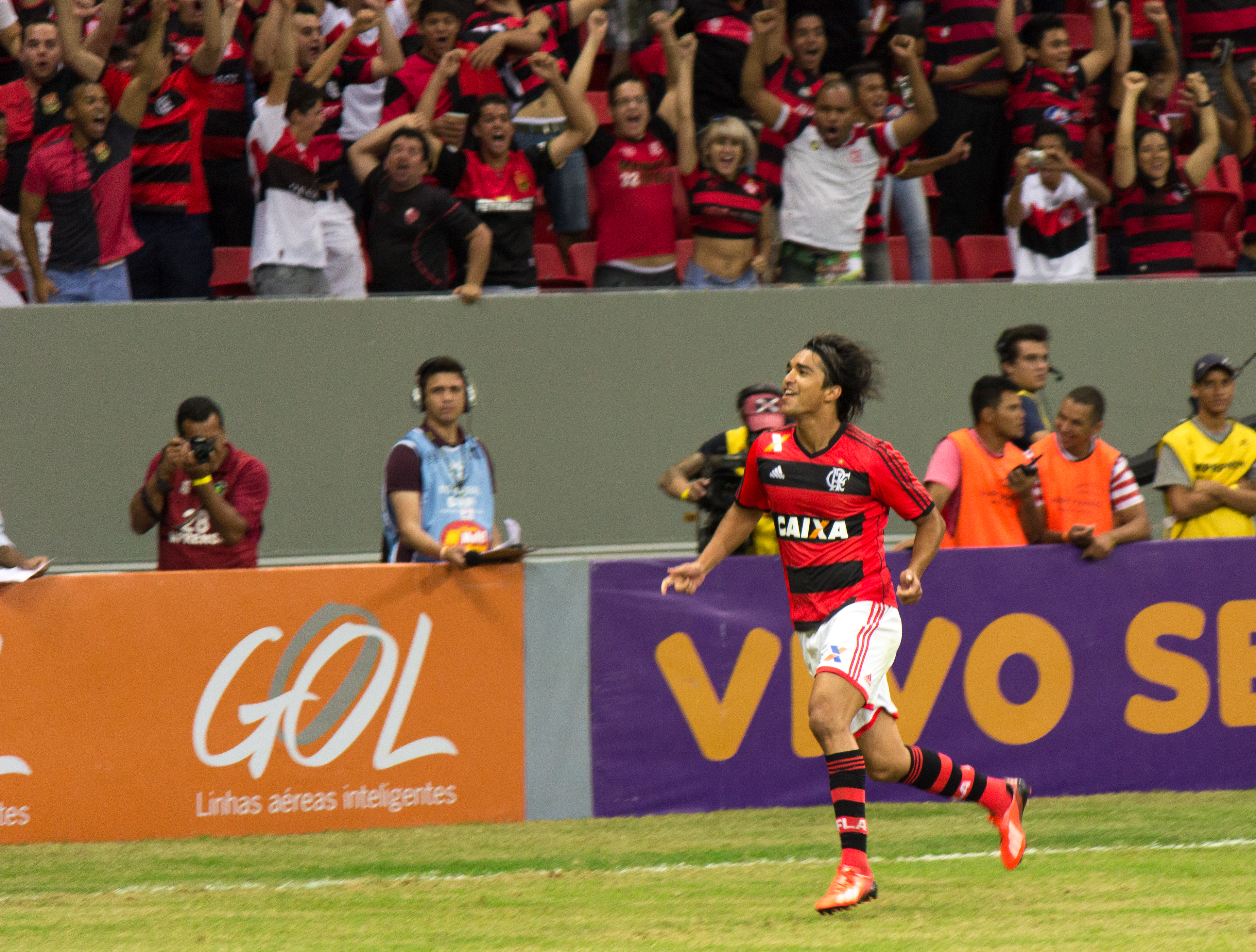 Gol de Marcelo Moreno na empate de 2x2 com o Coritiba.